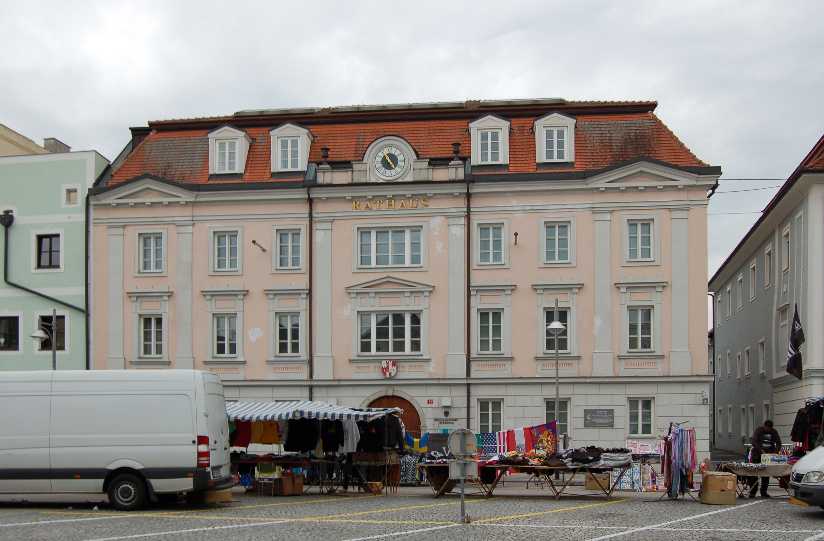 Das Bezirksgericht/Gemeindeamt am Stadtplatz 31 in Eferding, Oberösterreich.